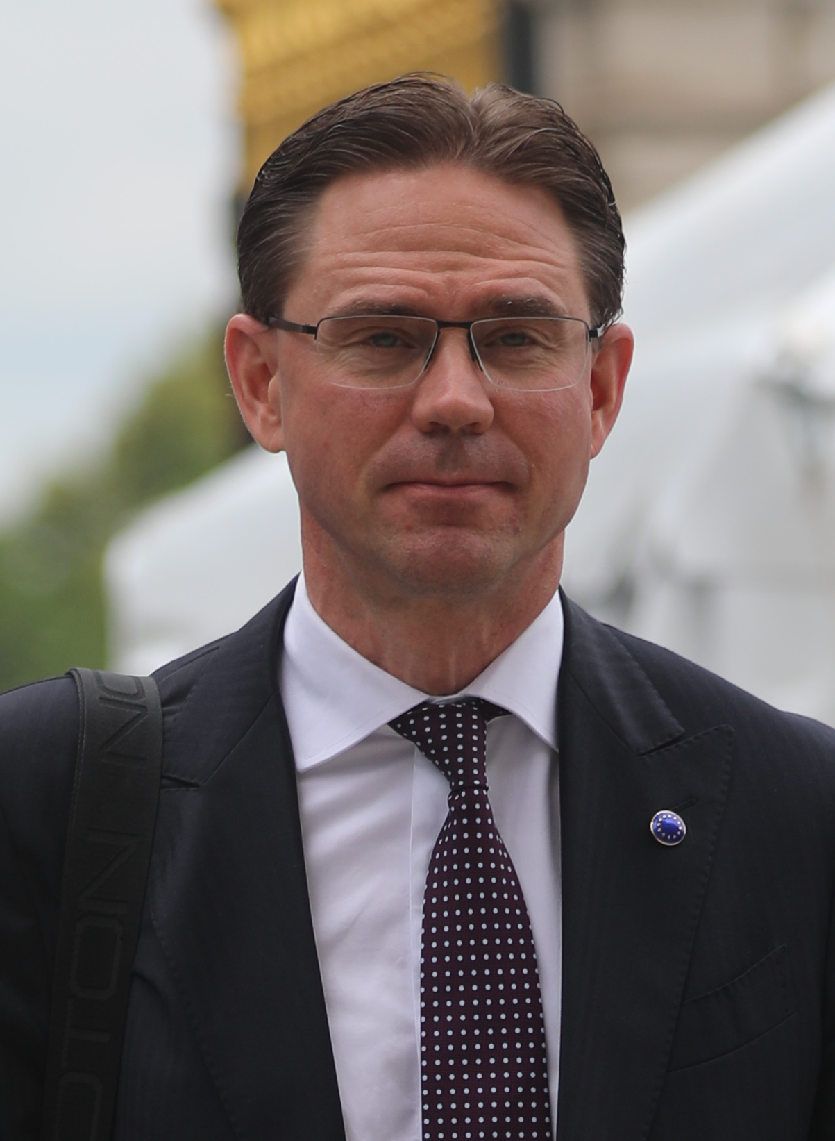 EPP Summit, 20 June 2019 Brussels